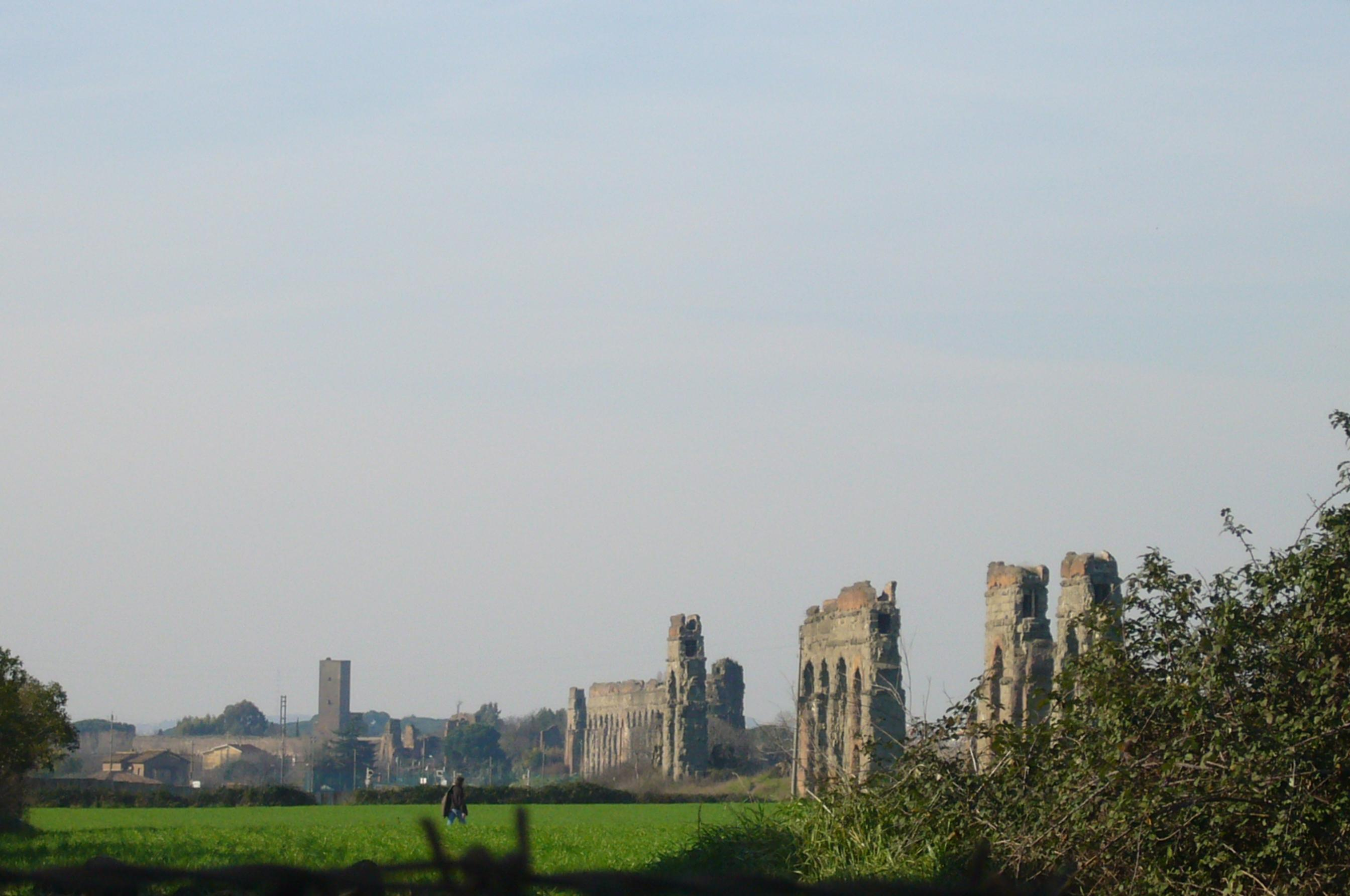 Roma, viale Appio Claudio, Parco degli Acquedotti